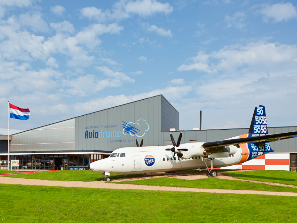 Hoofdentree van Luchtvaart-Themapark Aviodrome in Lelystad